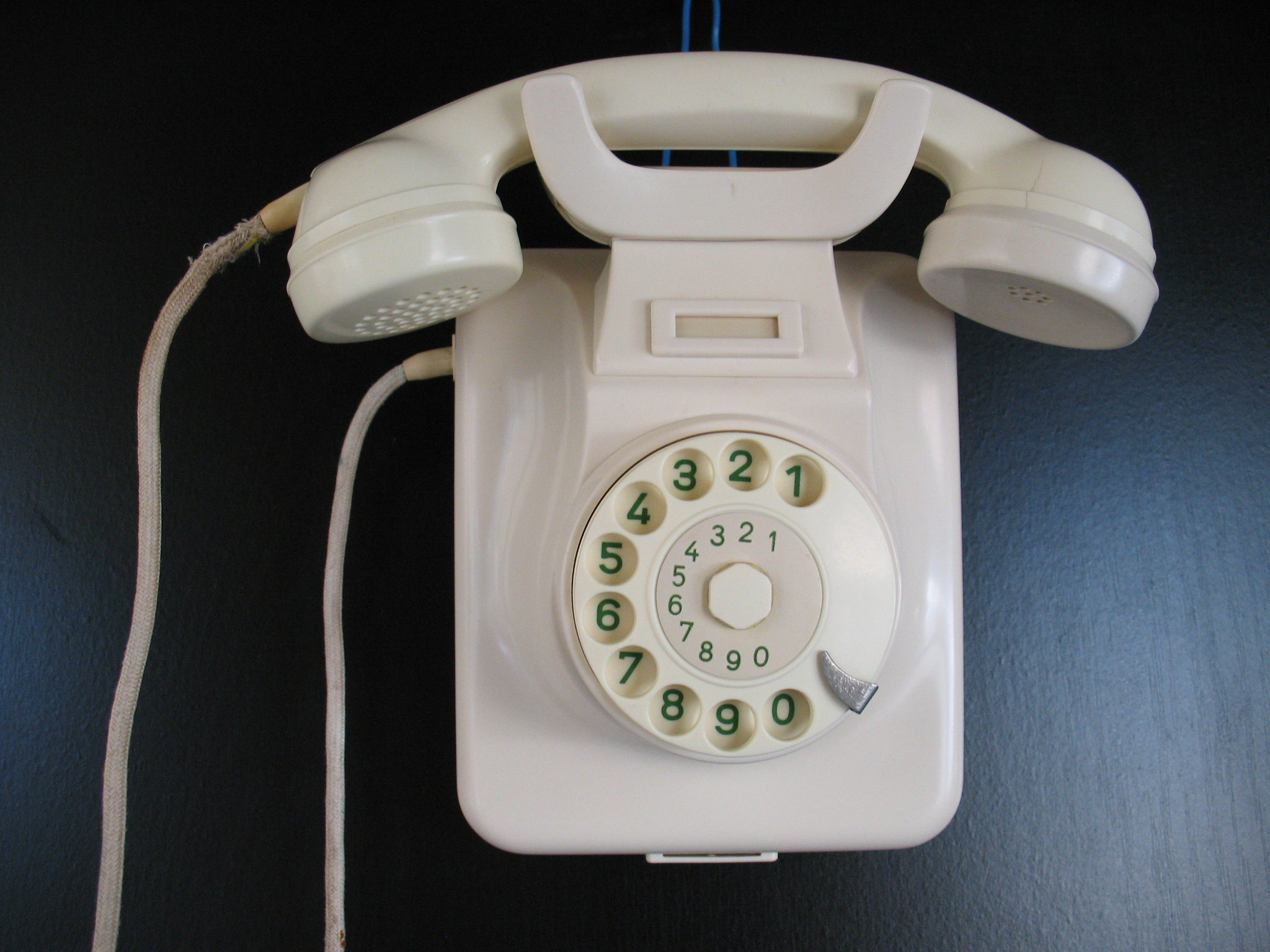 W49 als Wandfernsprecher von Hagenuk 1961